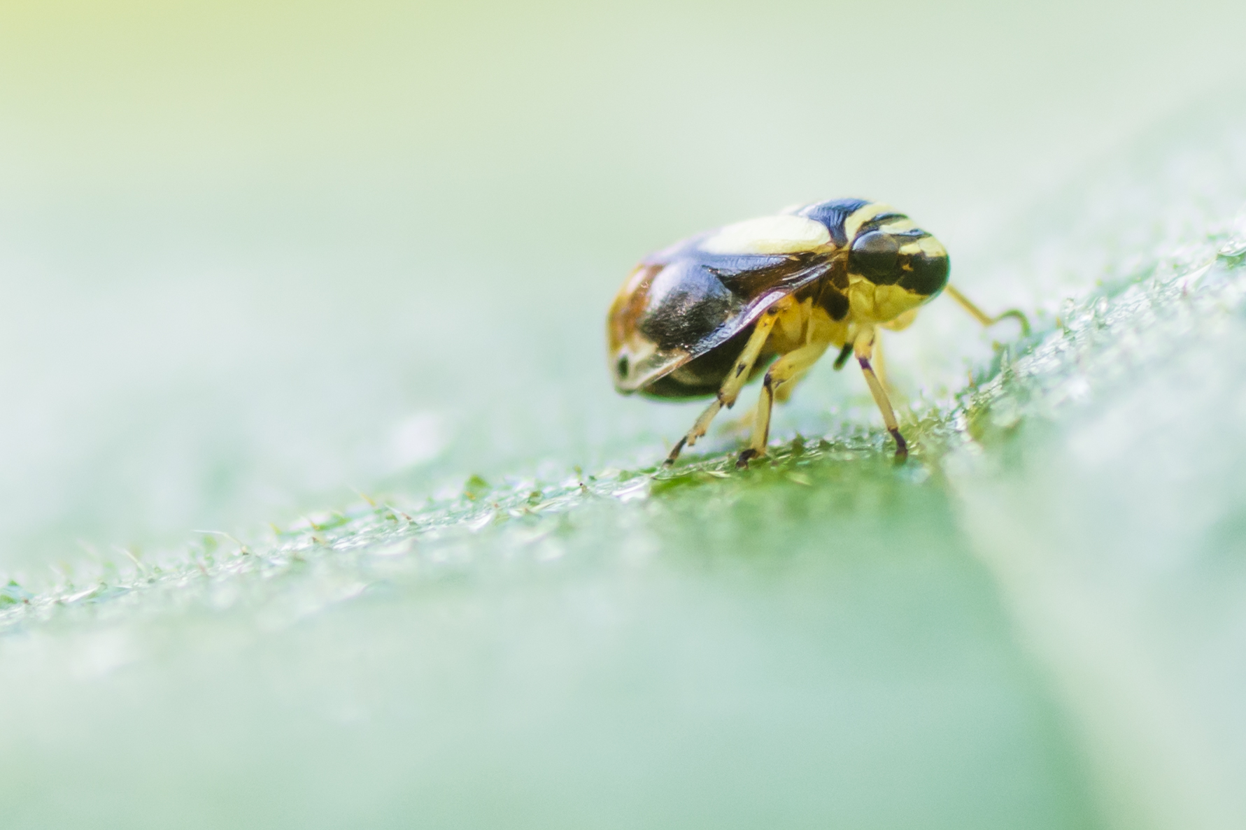 Siebenthaler Fen, Beavercreek, Ohio